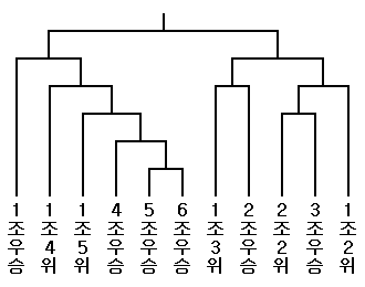 현행 용왕전 결승토너먼트표